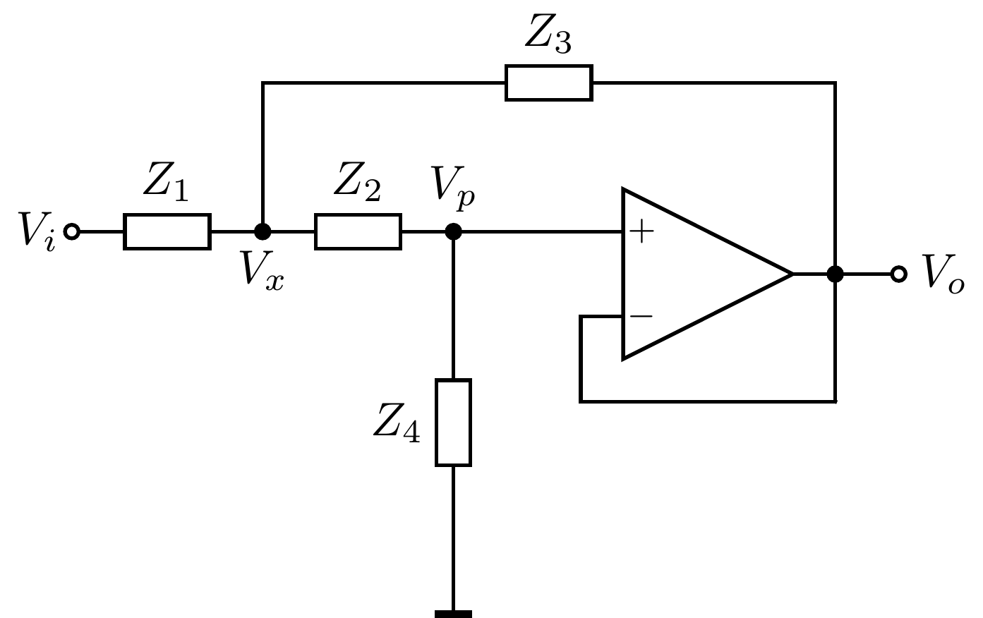 Esquema de Sallen-Key amb nom als nodes.